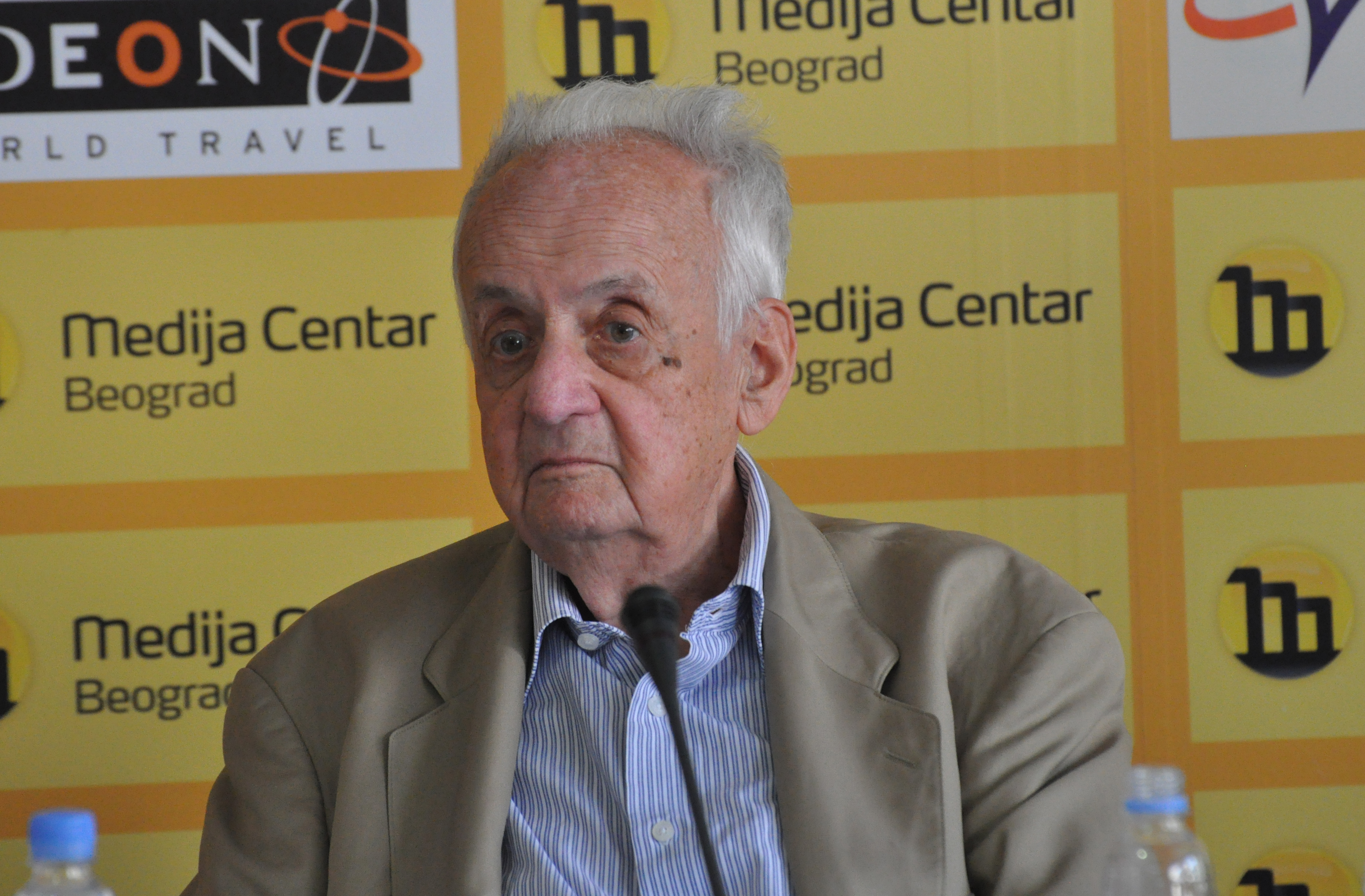 Иван Ивањи српски књижевник и преводилац